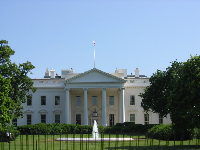 Das Weiße Haus, Mai 2004.